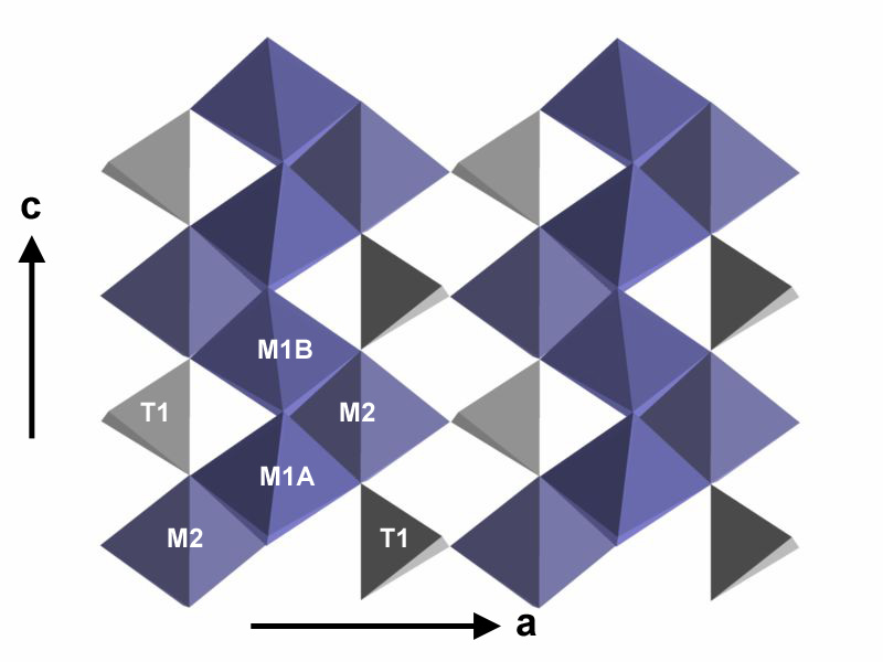 Detail der Staurolithstruktur: Alumosilikatschicht; Blick auf die a-c-Ebene M1A,B: dunkelblaue Oktaeder M2: violette Oktaeder T1: graue Tetaeder